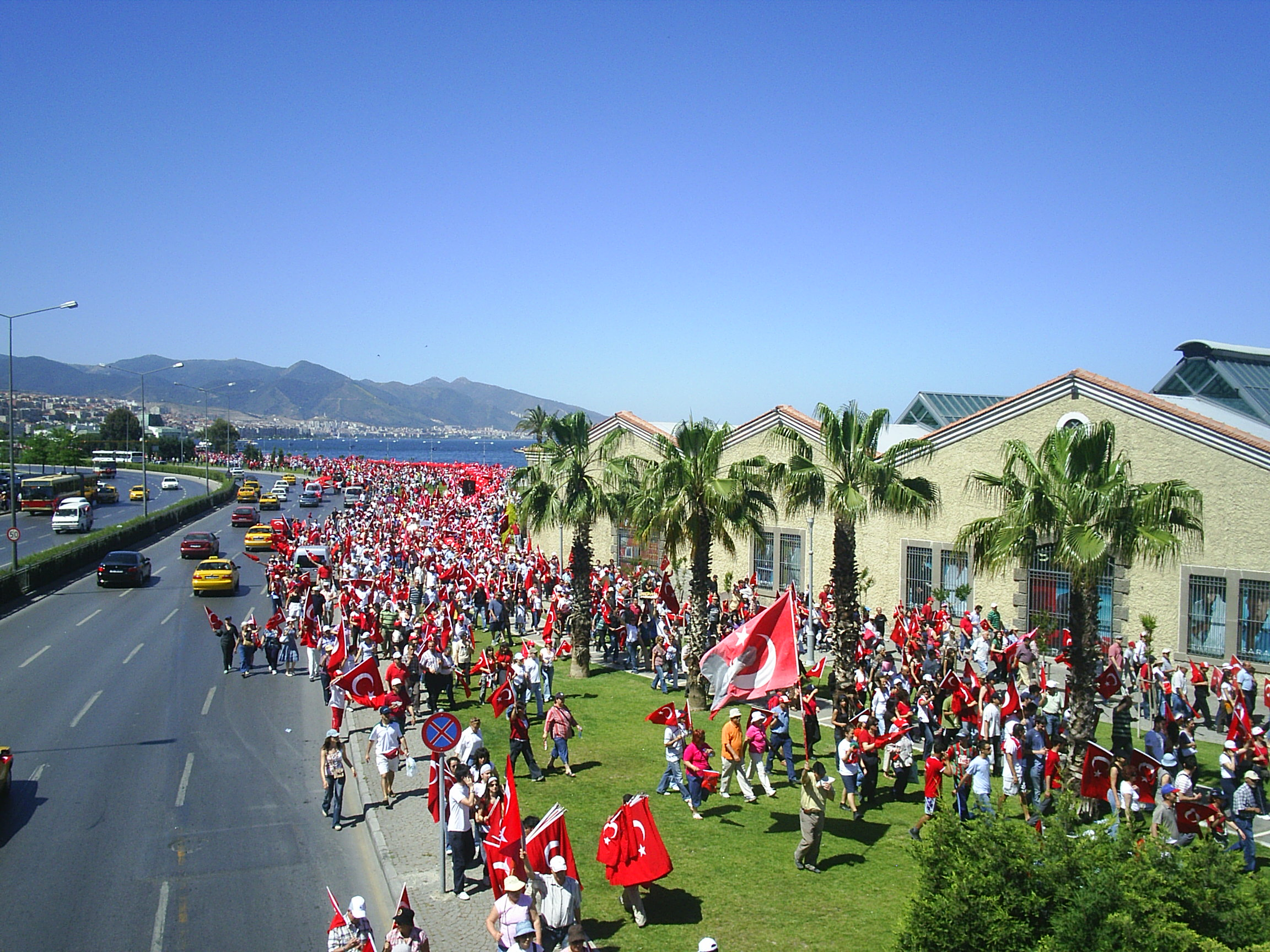 Protect Your Republic Protest, Gündoğdu square, İzmir